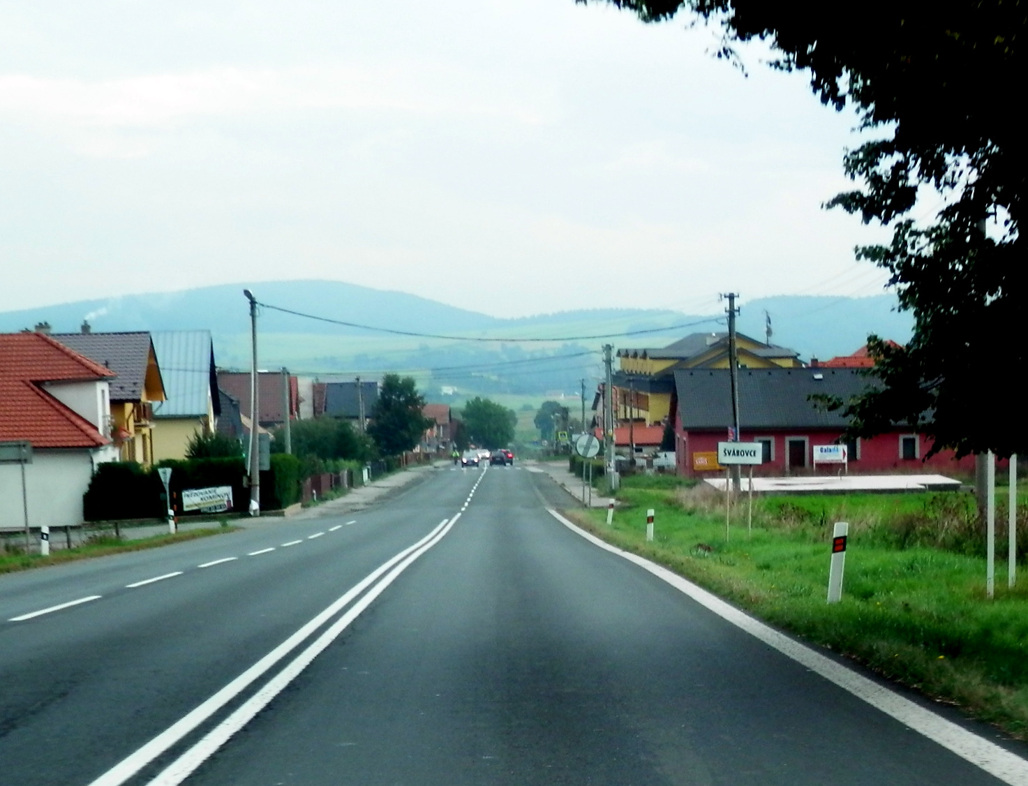 Cesta I.triedy z Popradu do Levoče v obci Švábovce, okres Poprad. Leto 2016.